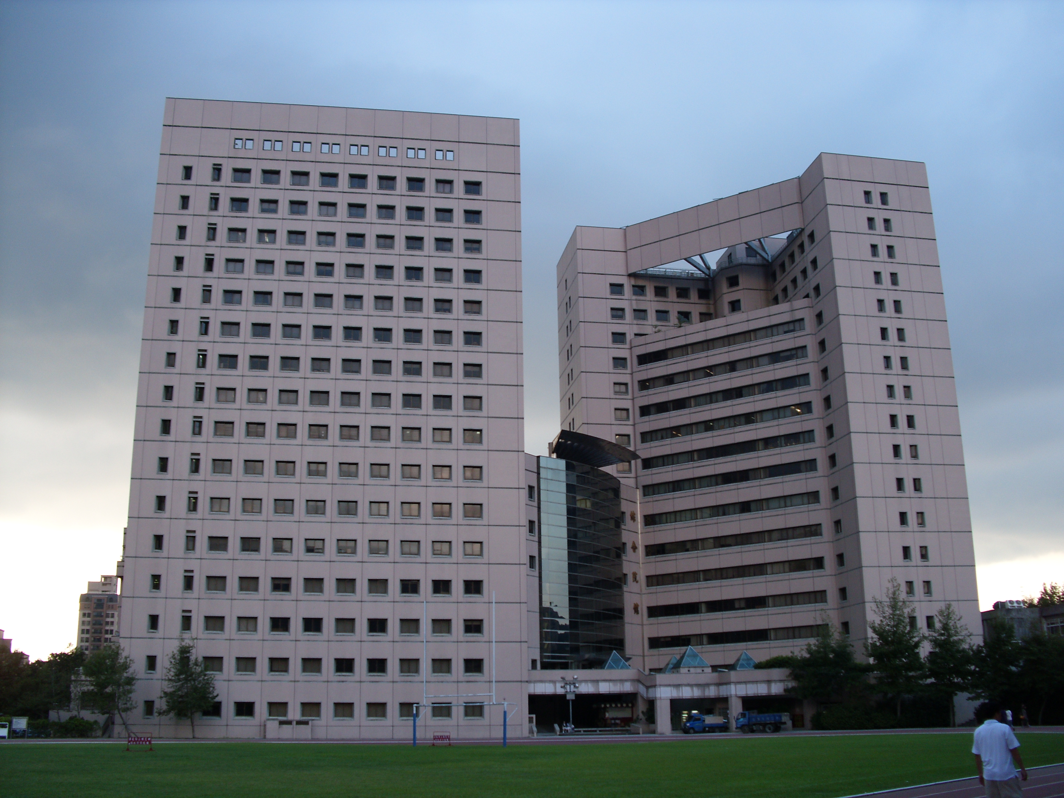 Bân-lâm-gú: 政治大學綜合院館